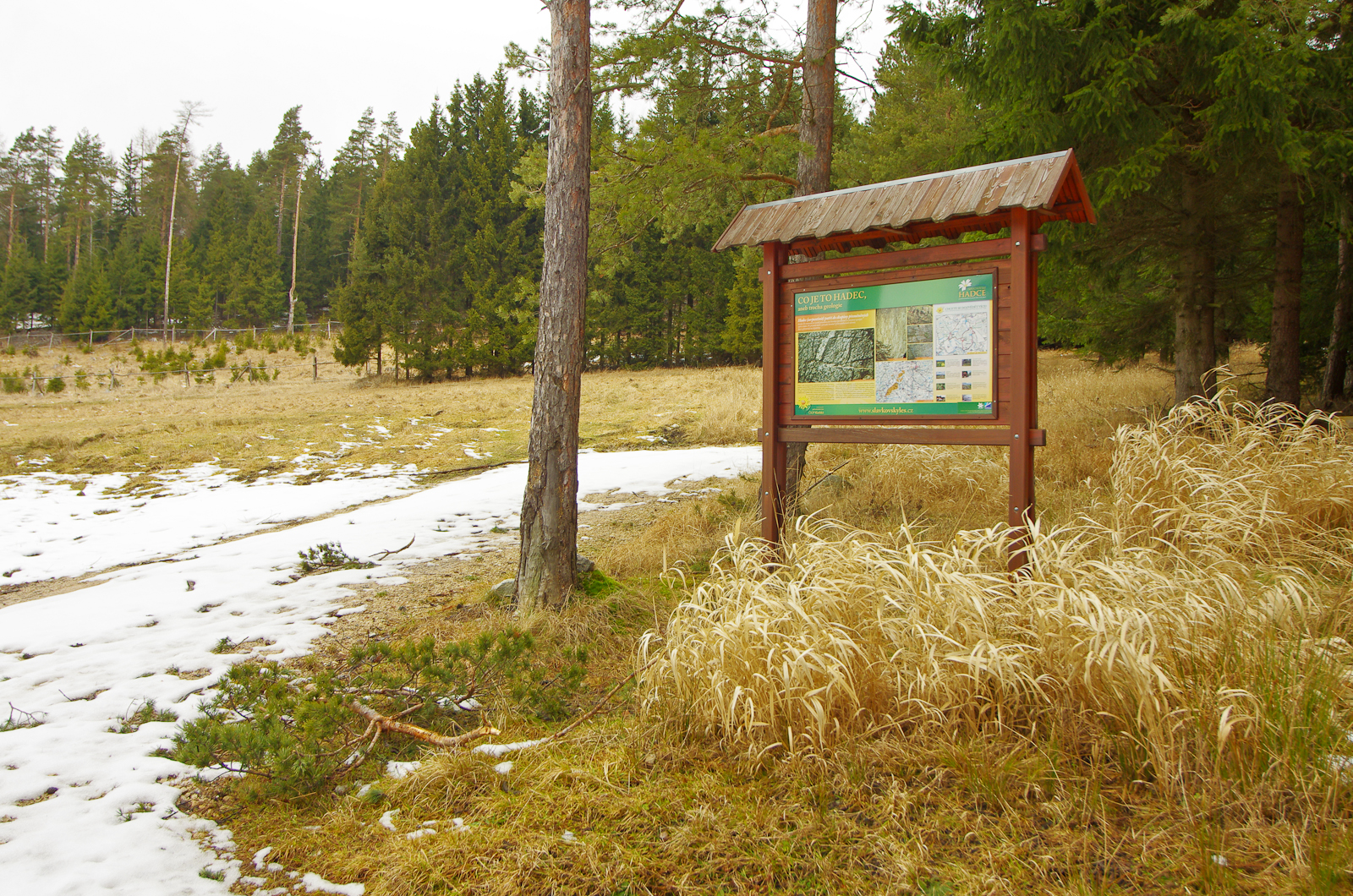 Naučná stezka - Mnichovské hadce, Slavkovský les, okres Sokolov, informační tabule u zastavení č.4 (na hranici s okresem Cheb) je věnovaná geologii. Informační tabule se nachází v místě křižovatky lesních cest, cca 350 m SZ od okraje NPR Pluhův bor, 300 m JZ od vrcholu kopce "V boru" (804 m n.m.); více